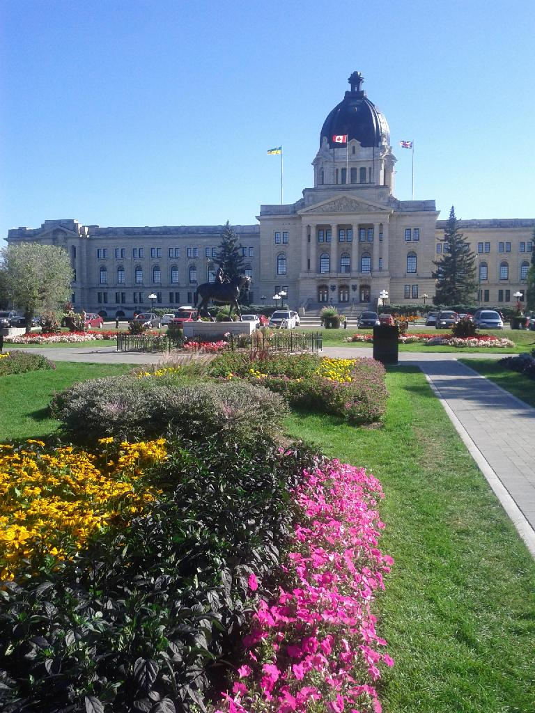 Saskatchewan Legislative Building and Grounds National Historic Site of Canada